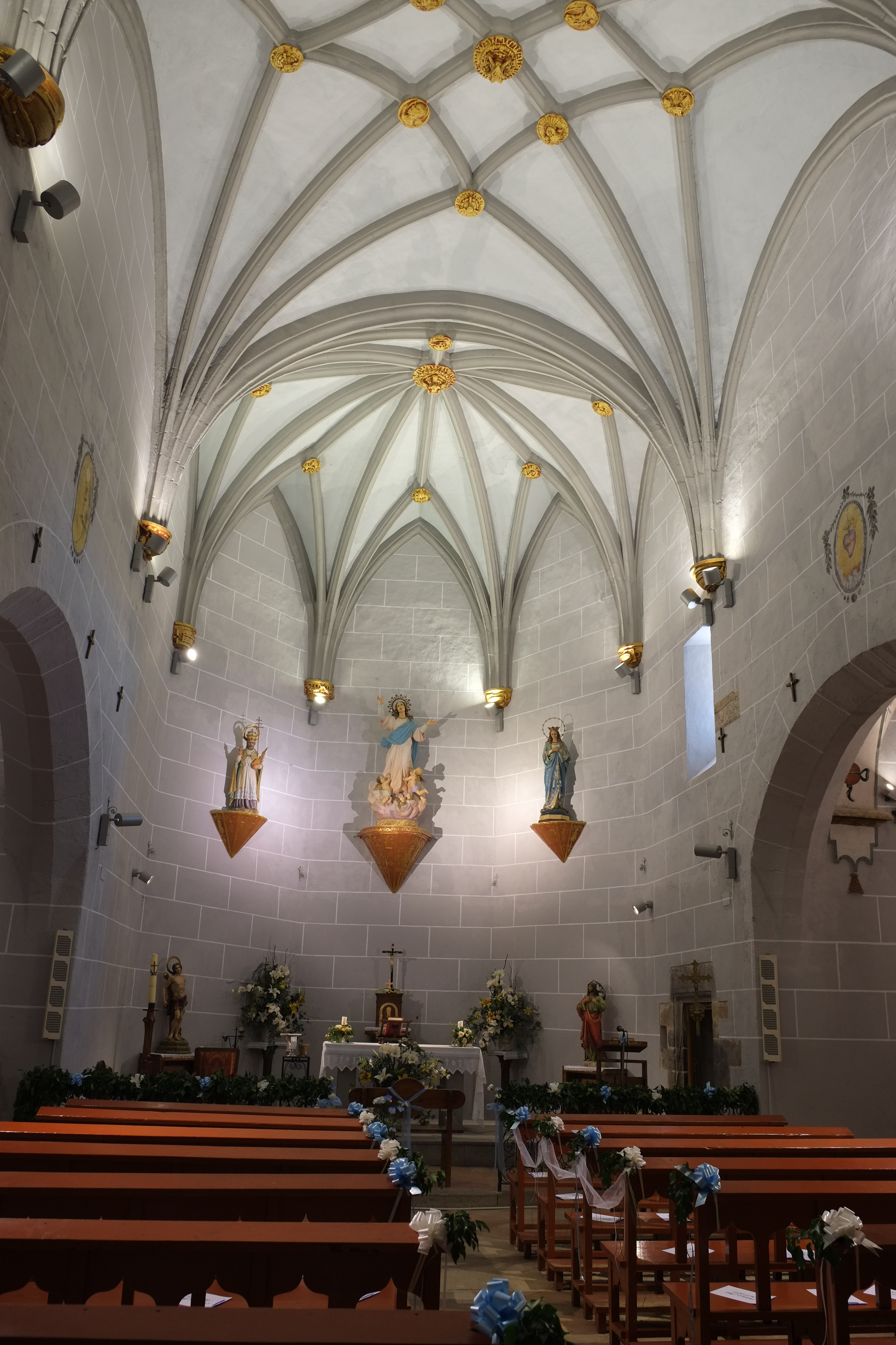 Kirche Nuestra Señora de La Asunción in La Puebla de Fantova in Aragonien (Spanien)